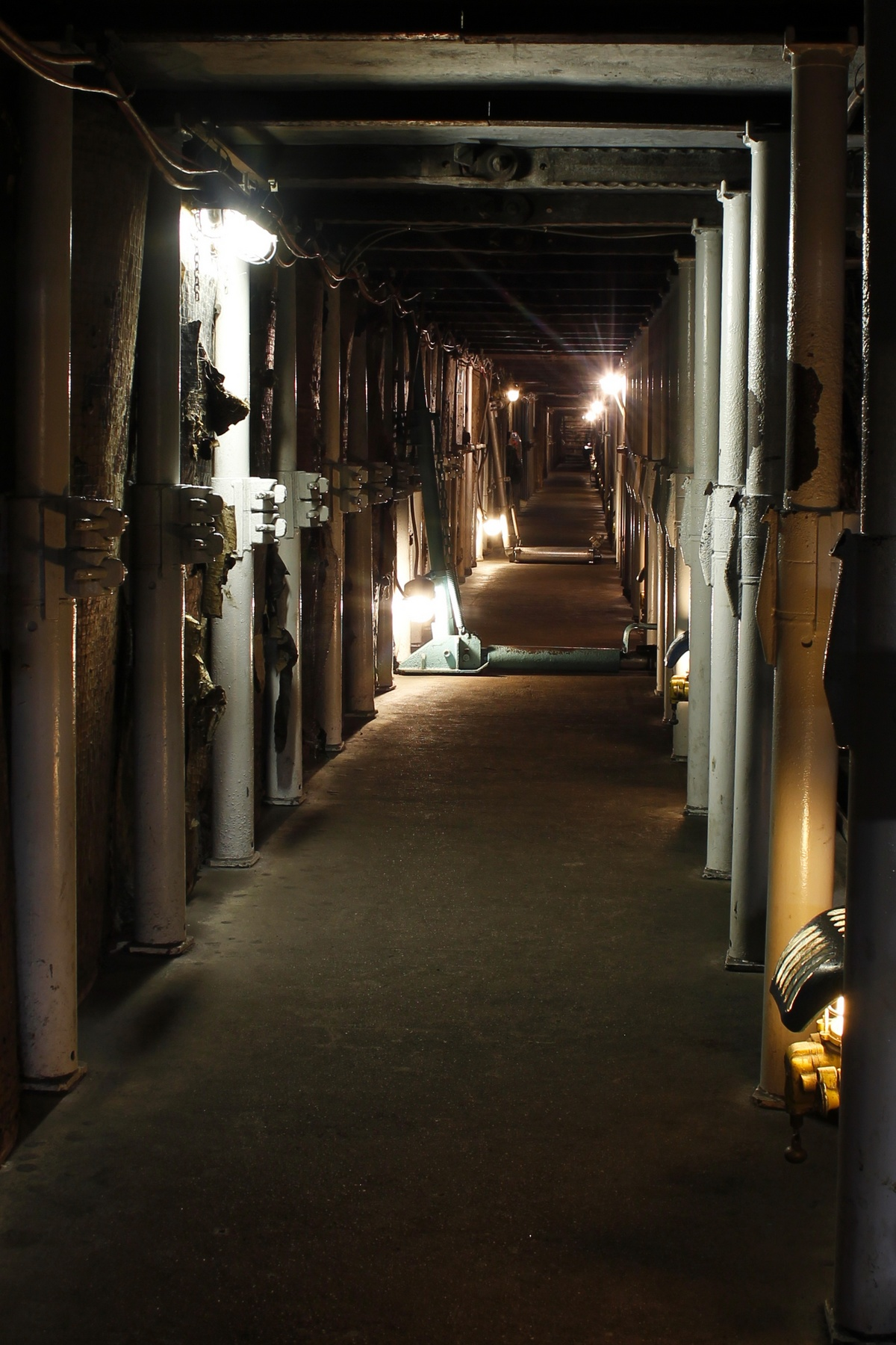 Bergbau Museum Bochum